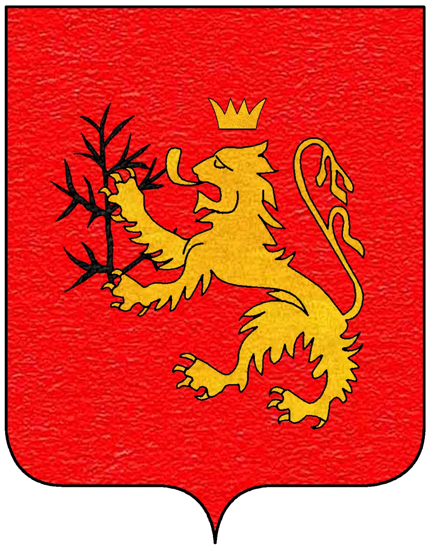 Stemma della famiglia Malaspina del Leone: di rosso, al leone d'oro coronato dello stesso, tenente colle branche uno spino secco di nero